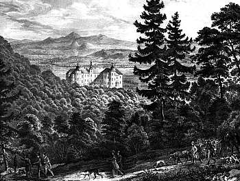 Zámek Jezeří. Rytina z roku 1830. Národní památkový ústav na Valdštejnském náměstí